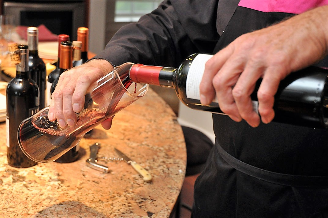 Dekantieren von Rotwein in eine Dekantierkaraffe (iittala Essence Decanter)